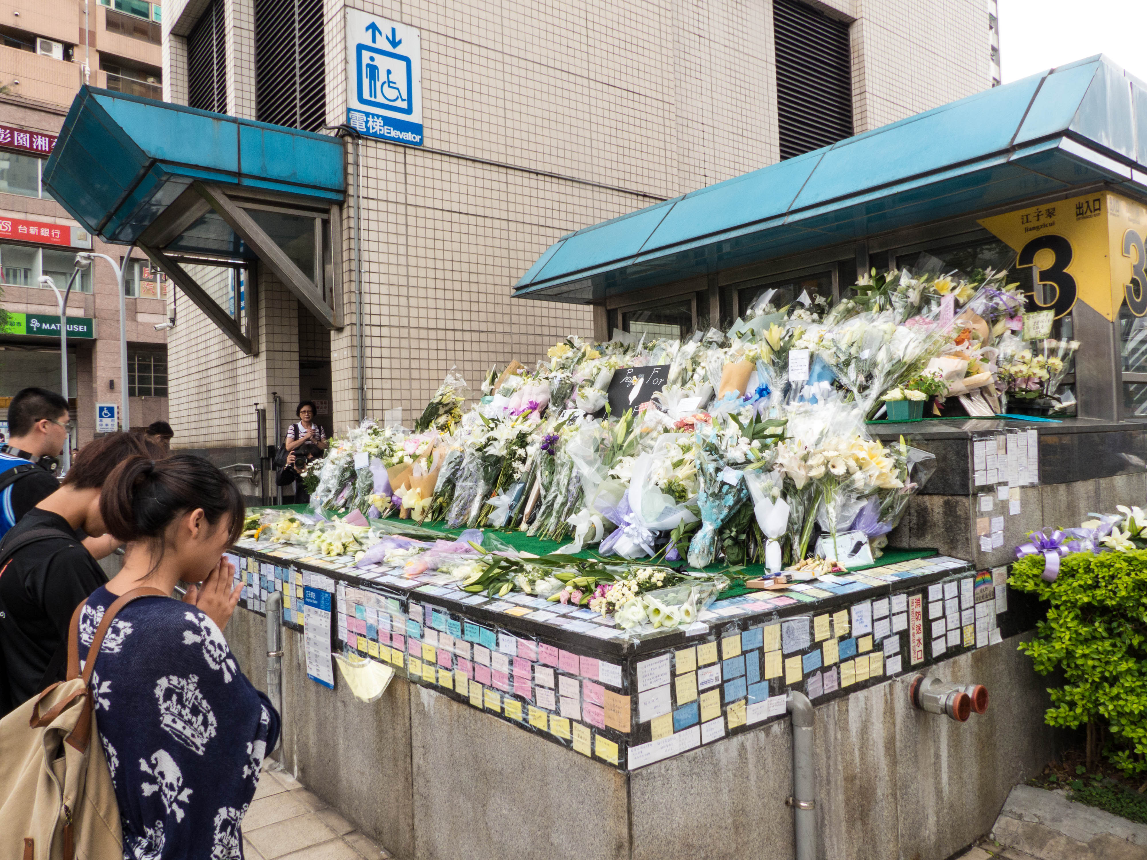 臺北捷運江子翠站三號出口後方的獻花臺與默禱民眾。